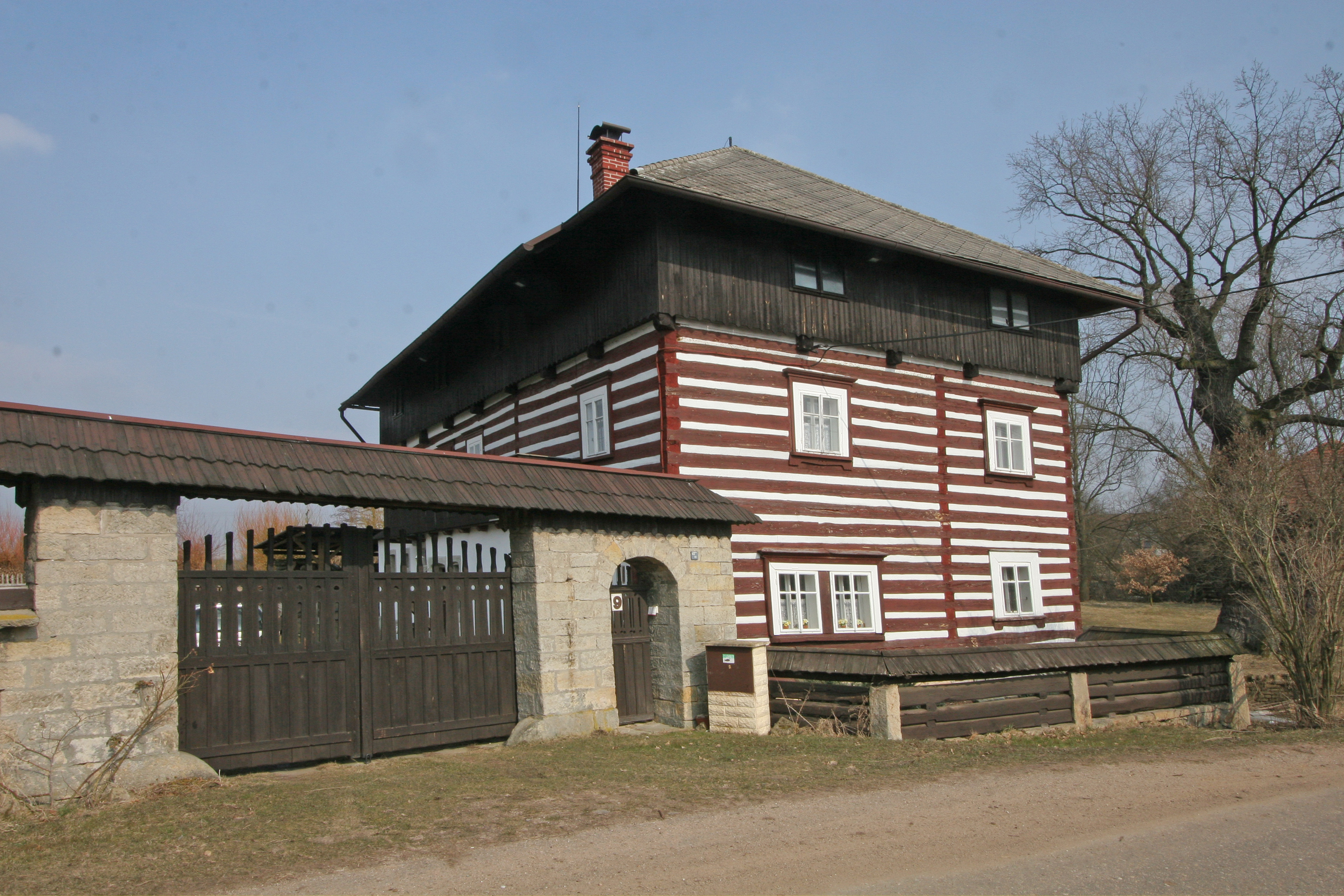 Popovice roubený mlýn čp 9